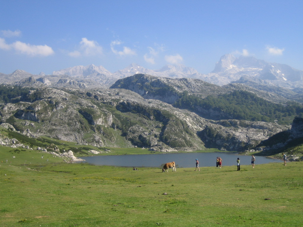 Lago Ercina en Covadonga (España)